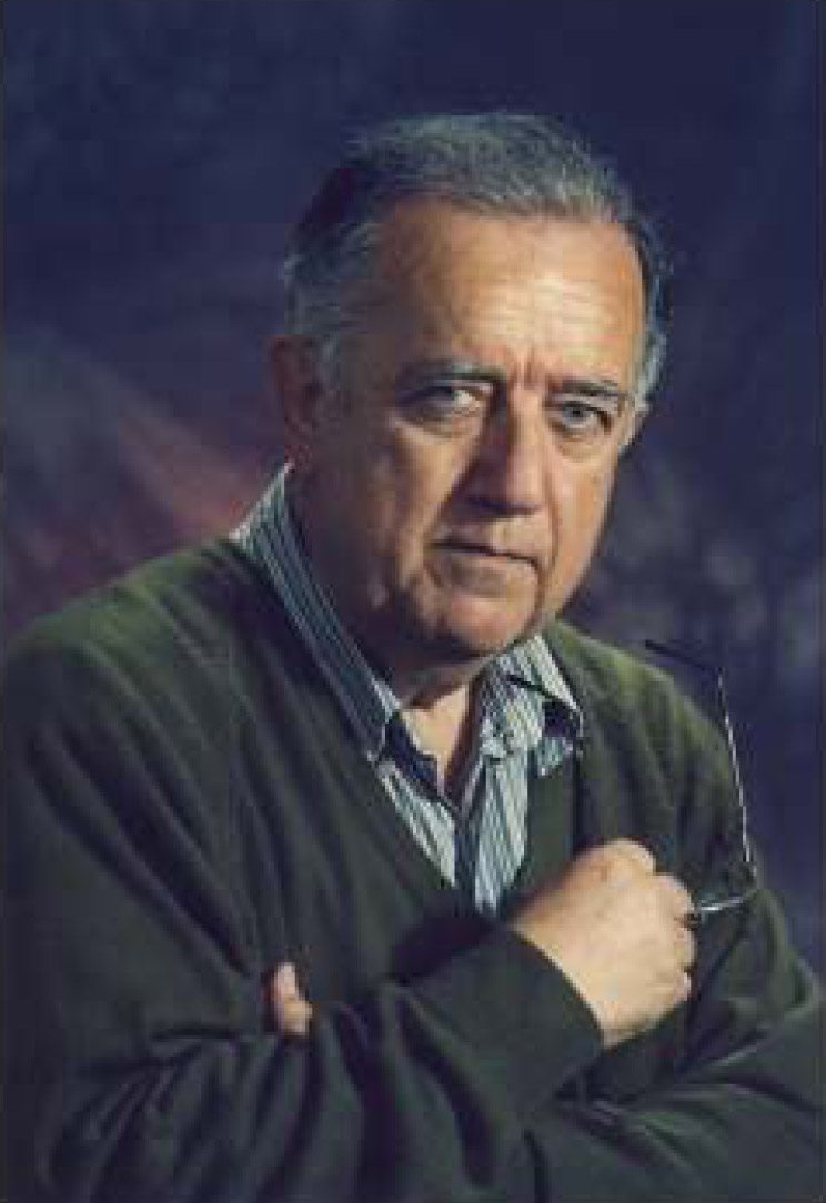 Miquel Crusafont i Sabater